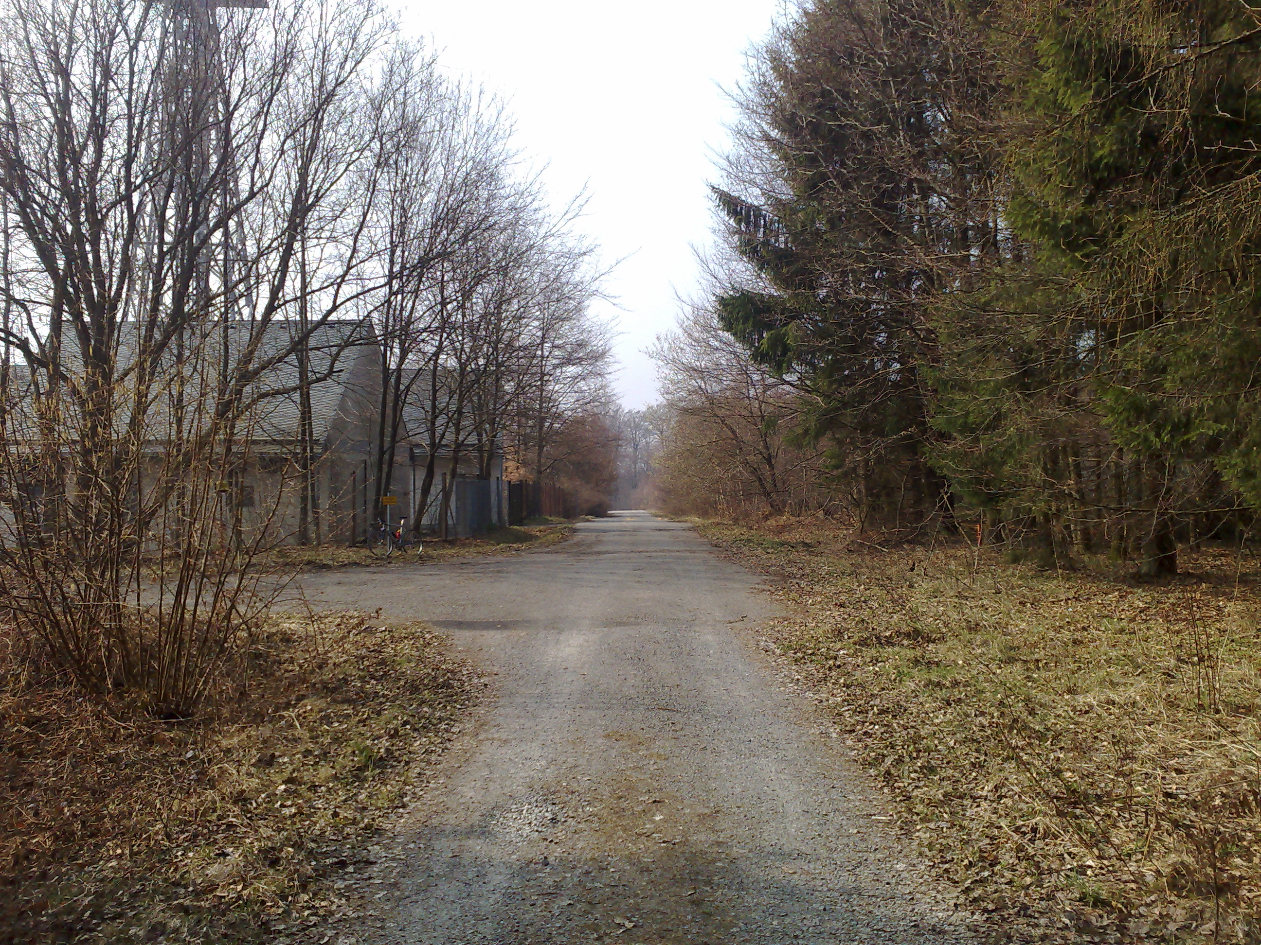 Geiersberg im Spessart (Deutschland)